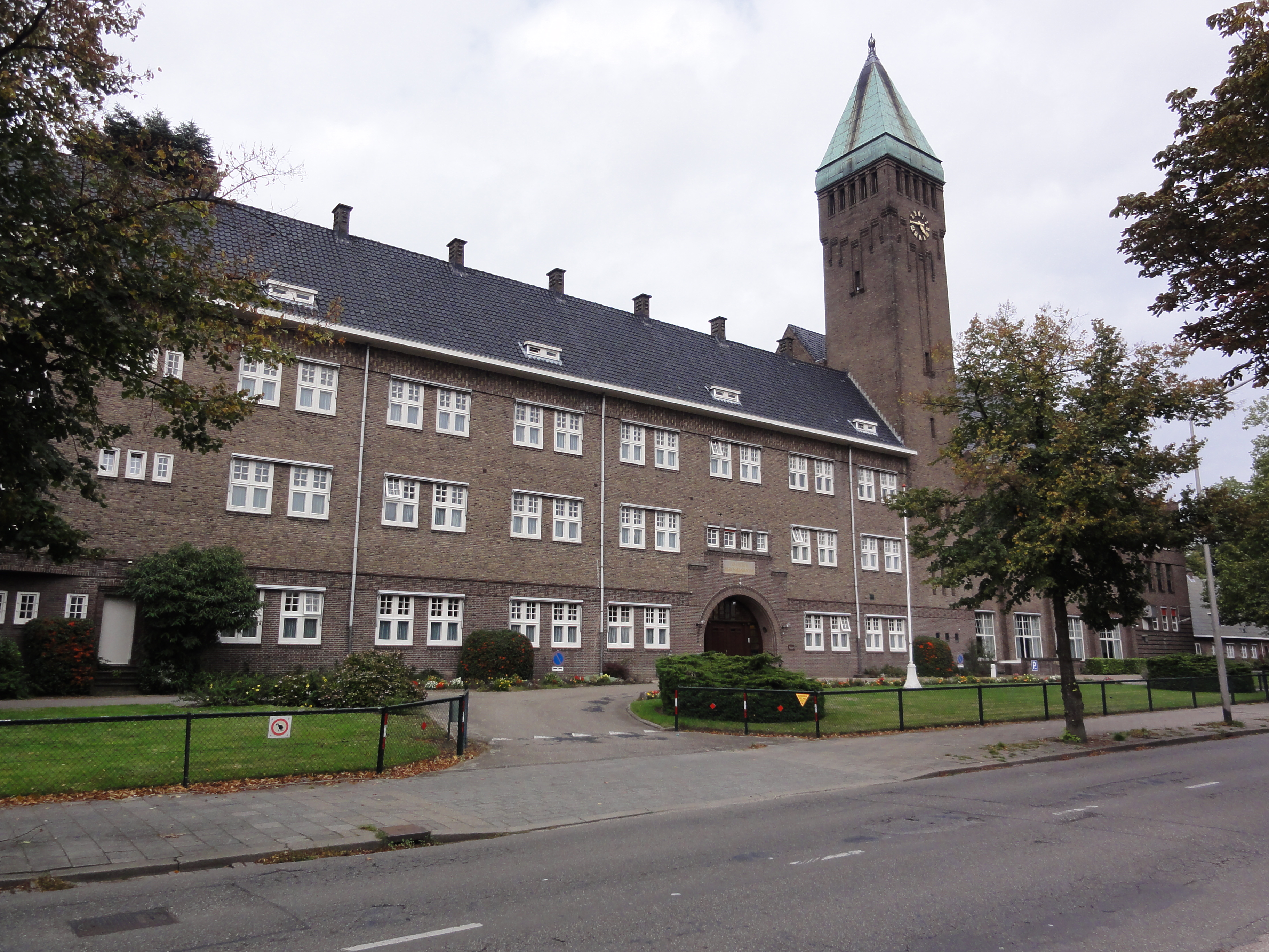 Nijmegen Rijksmonument 523017 Berchmanianum, voormalig jezuietenhuis, Houtlaan 4, vooraanzicht 32″ N, 5° 51′ 55.72″ E